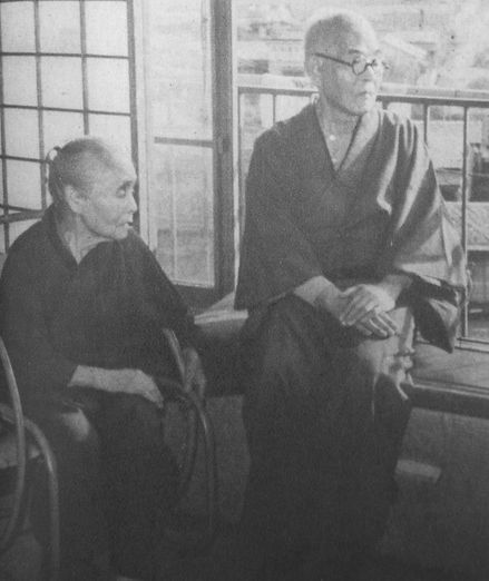 安部磯雄・コマヲ夫妻